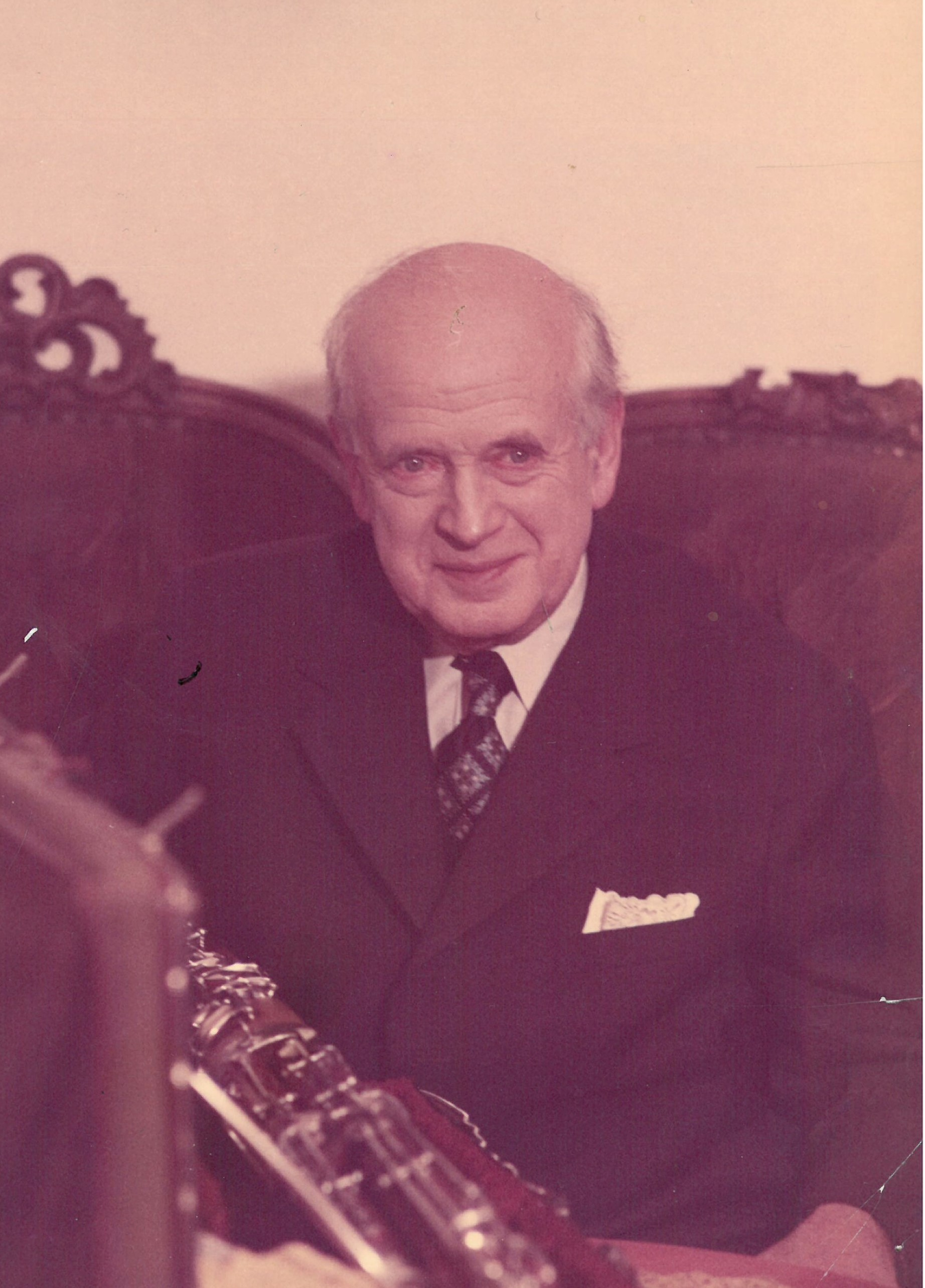 Profesor Karel Pivoňka